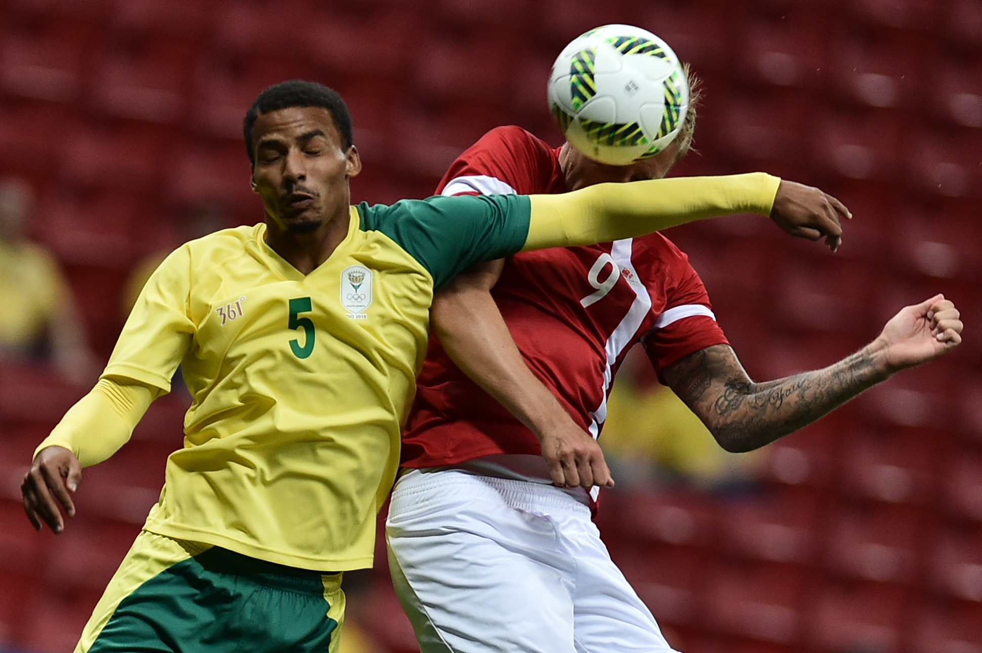 Estádio Nacional de Brasília Mané Garrincha, Brasília, DF, Brasil, 7/8/2016 Foto: Andre Borges/Agência Brasília. Dinamarca e África do Sul jogam neste domingo (7), no Estádio Mané Garrincha, pelo grupo A do futebol masculino nas Olimpíadas 2016. A Dinamarca venceu a África do Sul por 1x0, com gol de Robert Skov no segundo tempo.